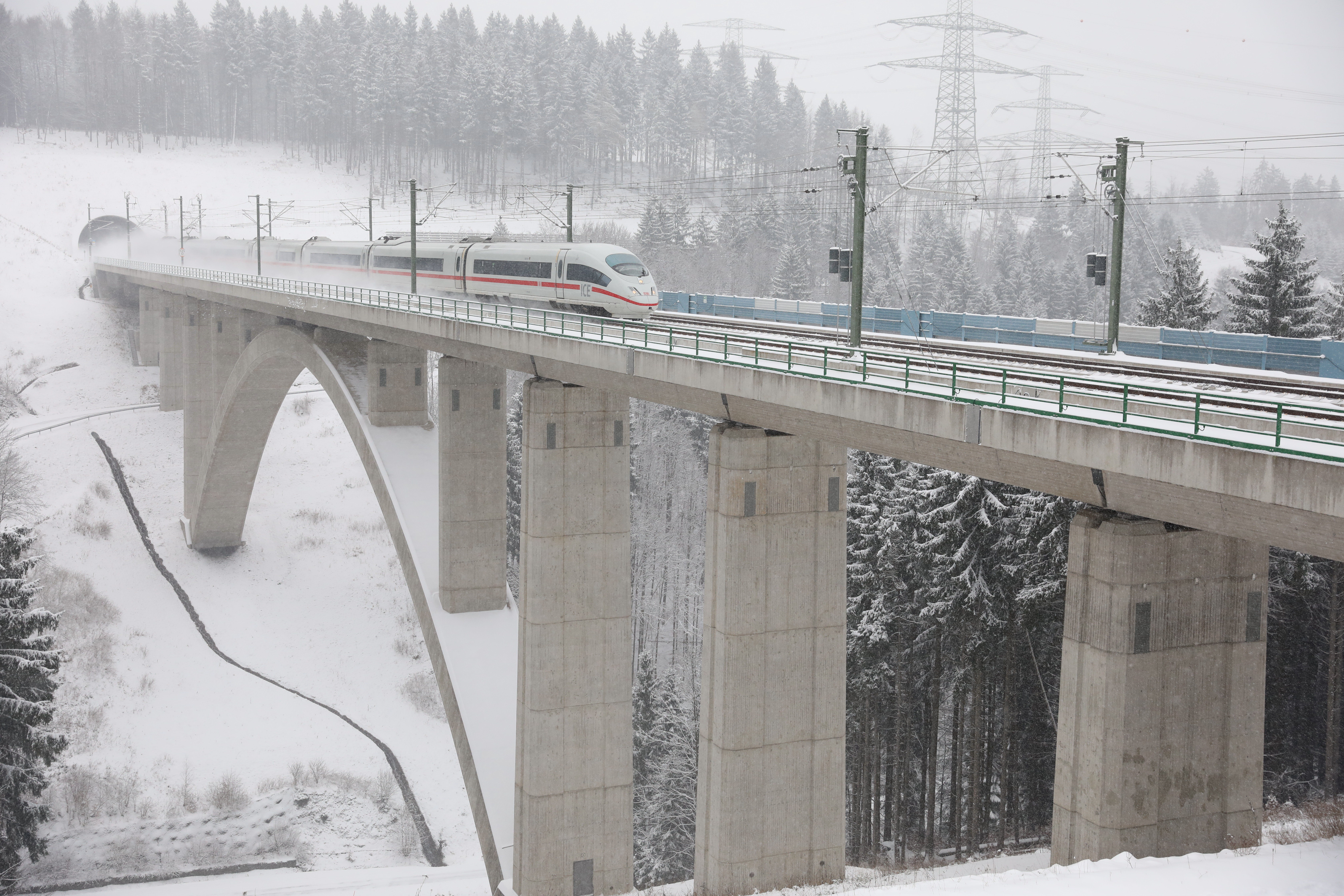 Dunkeltalbrücke